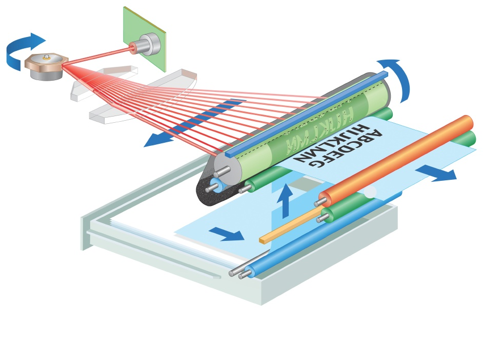 Lazerli printerin işləmə prosesi.